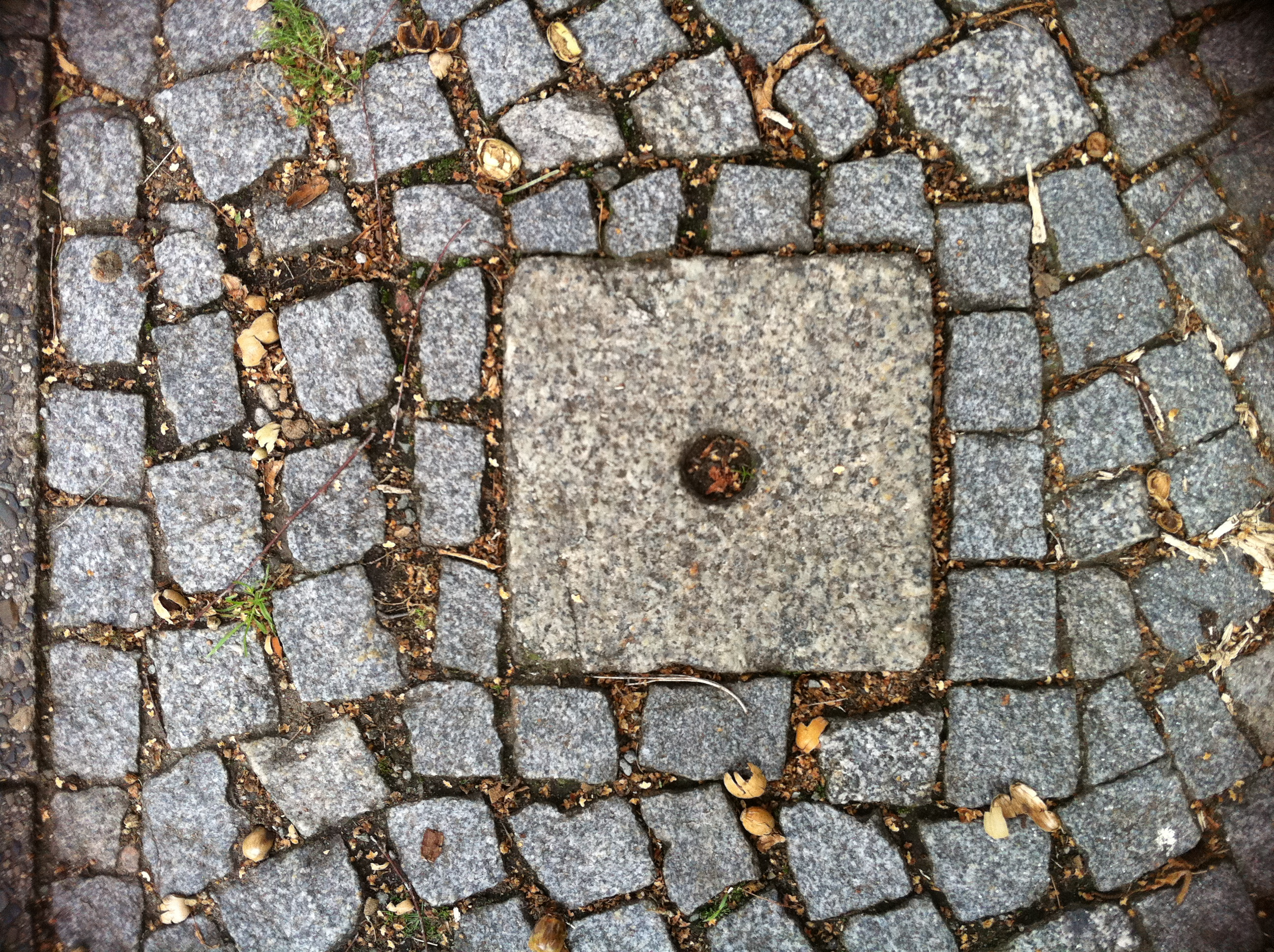 Polygonmarke in Berlin (Granitstein mit Zentrierloch, Kopfmaße 20cm * 20 cm), Berlin-Spandau